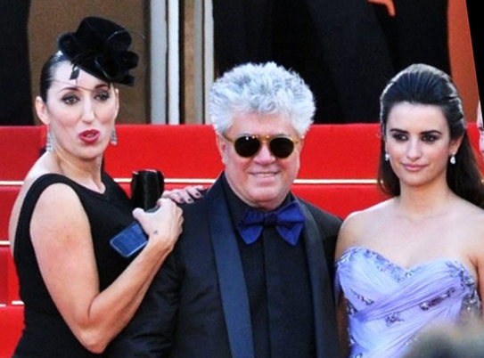 Rossy de Palma, Pedro Almodovar et Penélope Cruz au festival de Cannes (présentation du film Etreintes brisées)